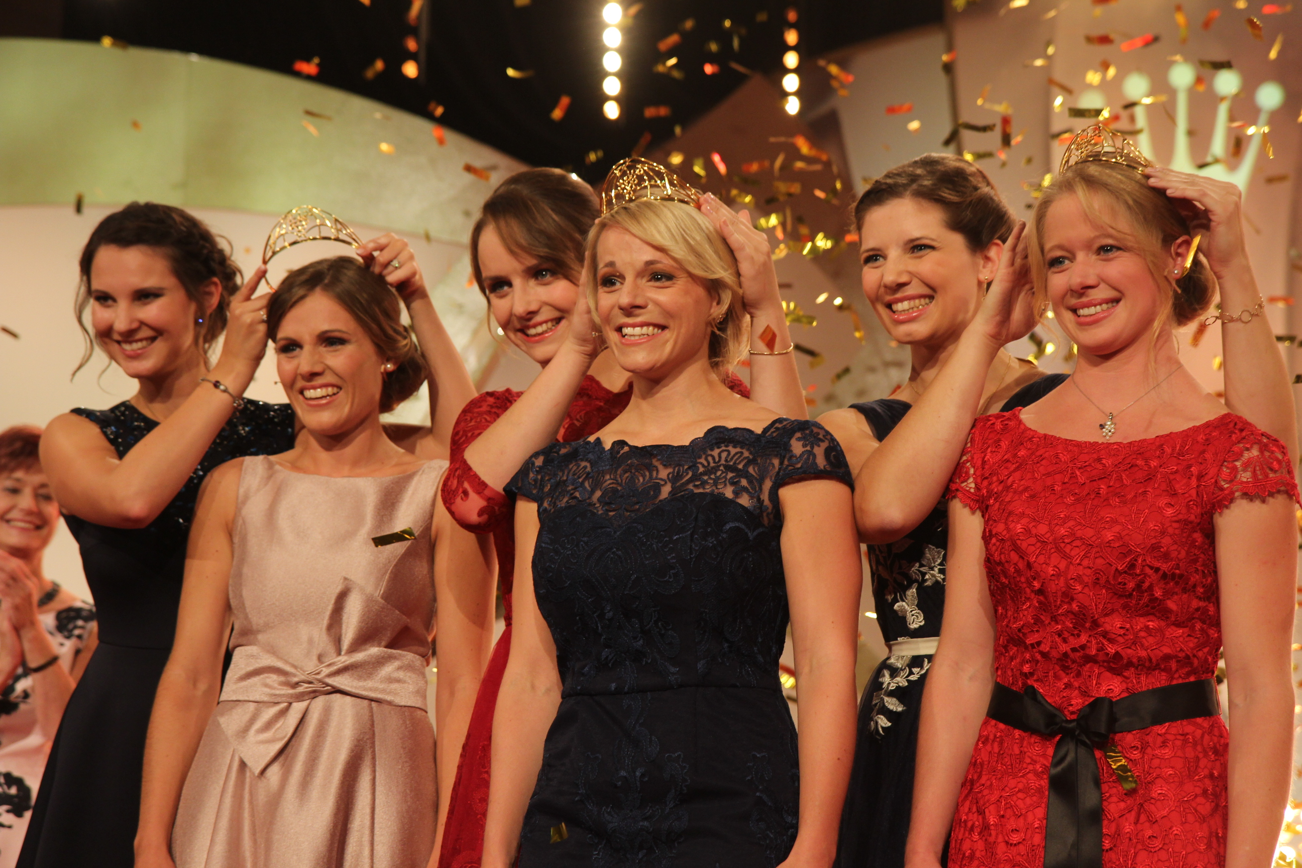 Krönung der Deutschen Weinkönigin 2017/18 (Weinwirtschaftsjahr 2018) Die Bekrönten Katharina Staab, Nahe (Mitte), Laura Lahm, Reinhessen (links) und Charlotte Freiberger, Bergstraße (Rechts). Die Ausführenden sind die Vorjahressieger Mara Walz (Württemberg), Lena Endesfelder (Mosel) Mitte, Christina Schneider (Franken)